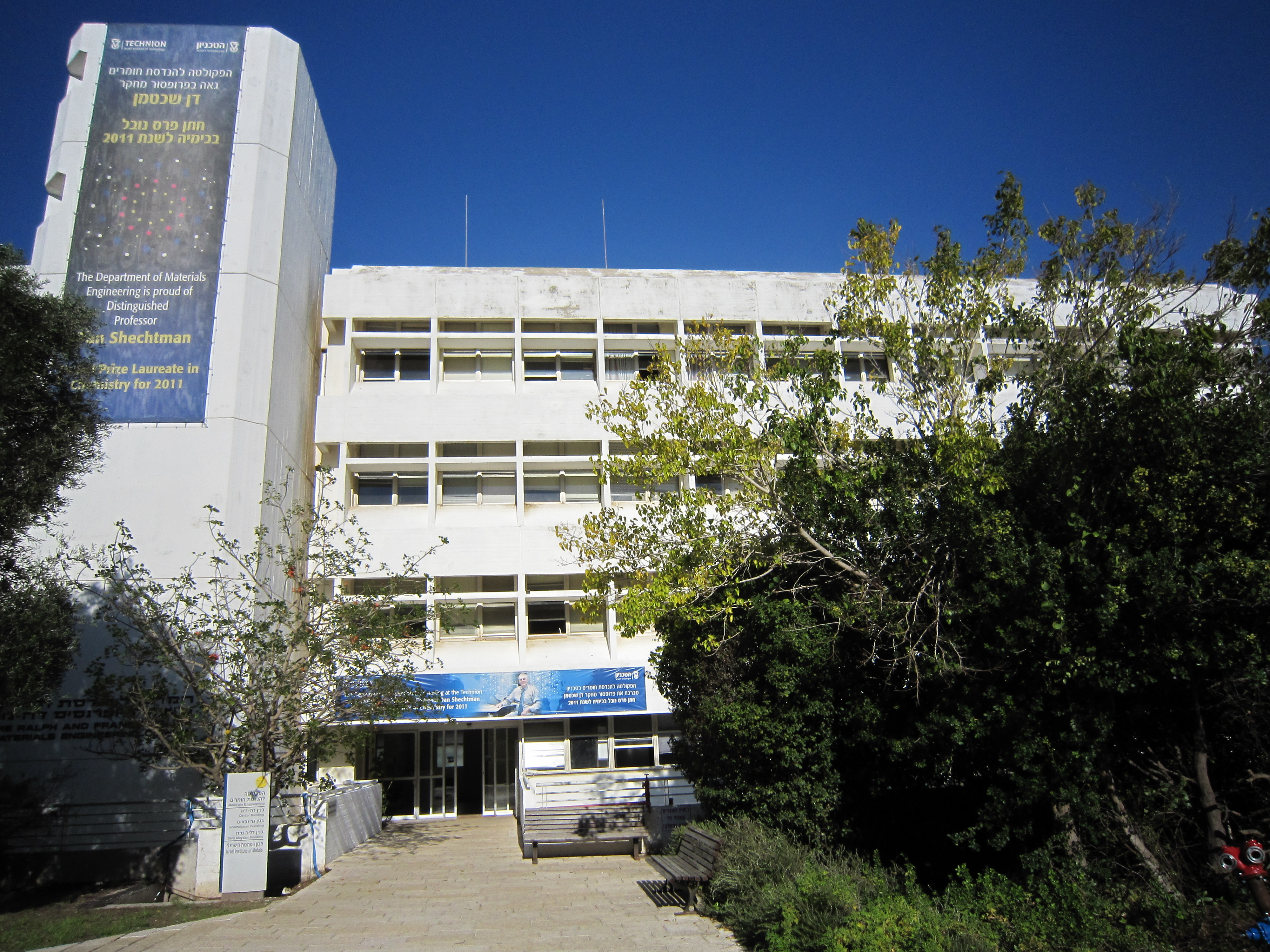 בניין הפקולטה למדע והנדסה של חומרים בטכניון